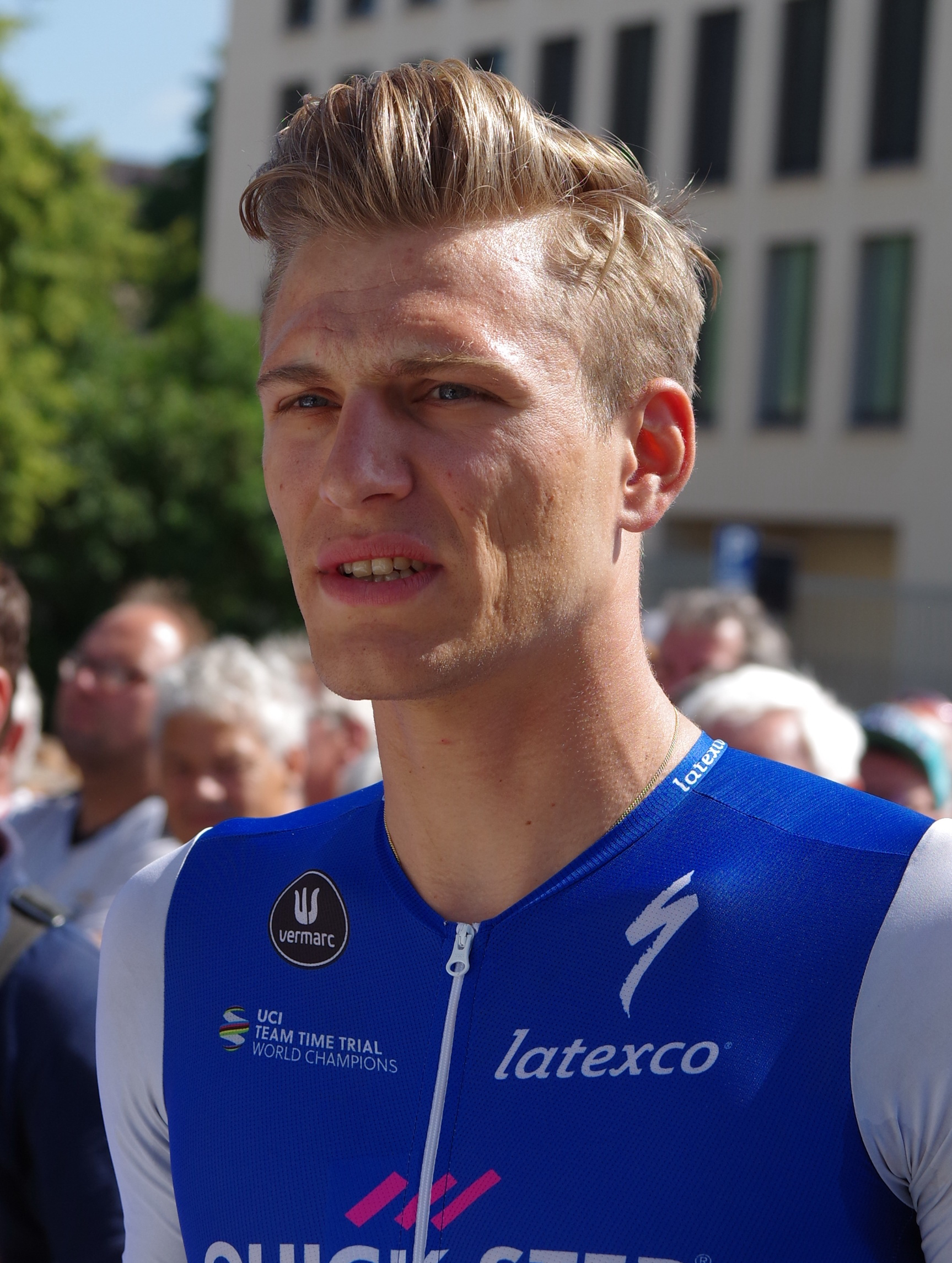 Deutsche Meisterschaften im Straßenrennen 2017 (Männer) 25. Juni 2017 Einschreibkontrolle The making of this document was supported by the Community-Budget of Wikimedia Germany.